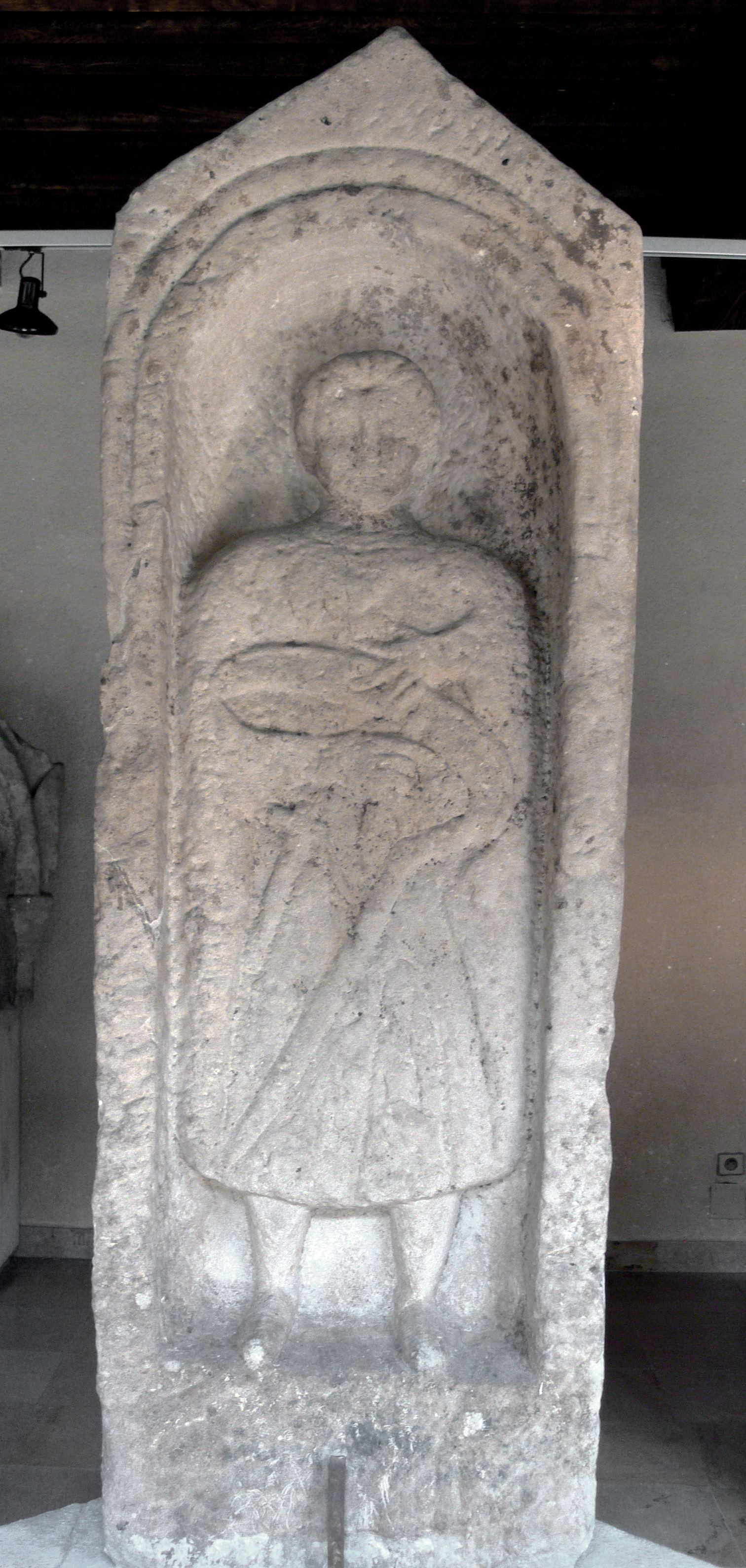 Stèle funéraire d'époque gallo-romaine, dite du faucheur, provenant de Francalmont (Haute-Saône) où elle fut découverte en 1820. Grès rose. Vesoul, musée Georges-Garret, inv. 962.2.3, don de Mme Chardot